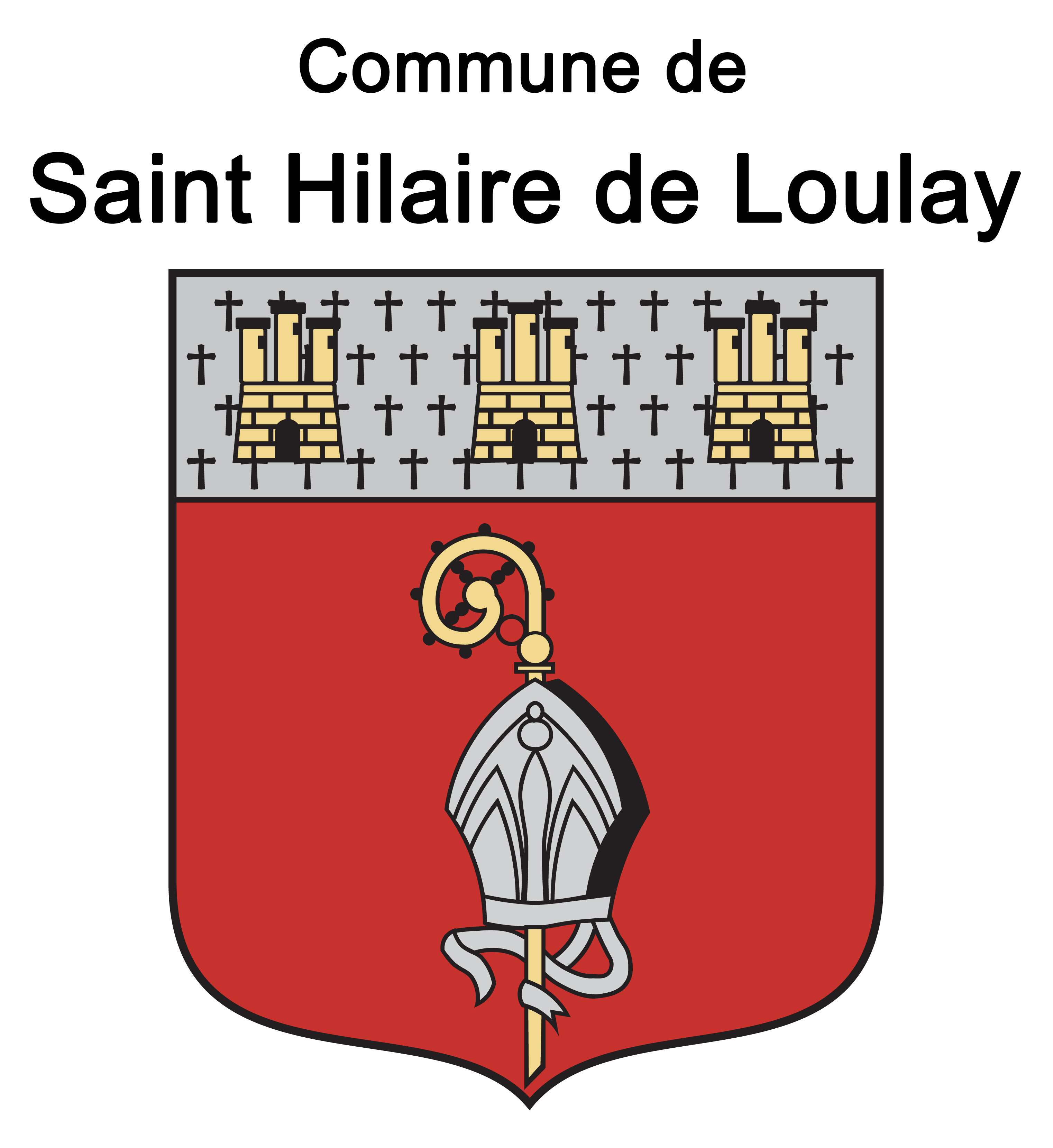 Blason commune de Saint Hilaire de Loulay